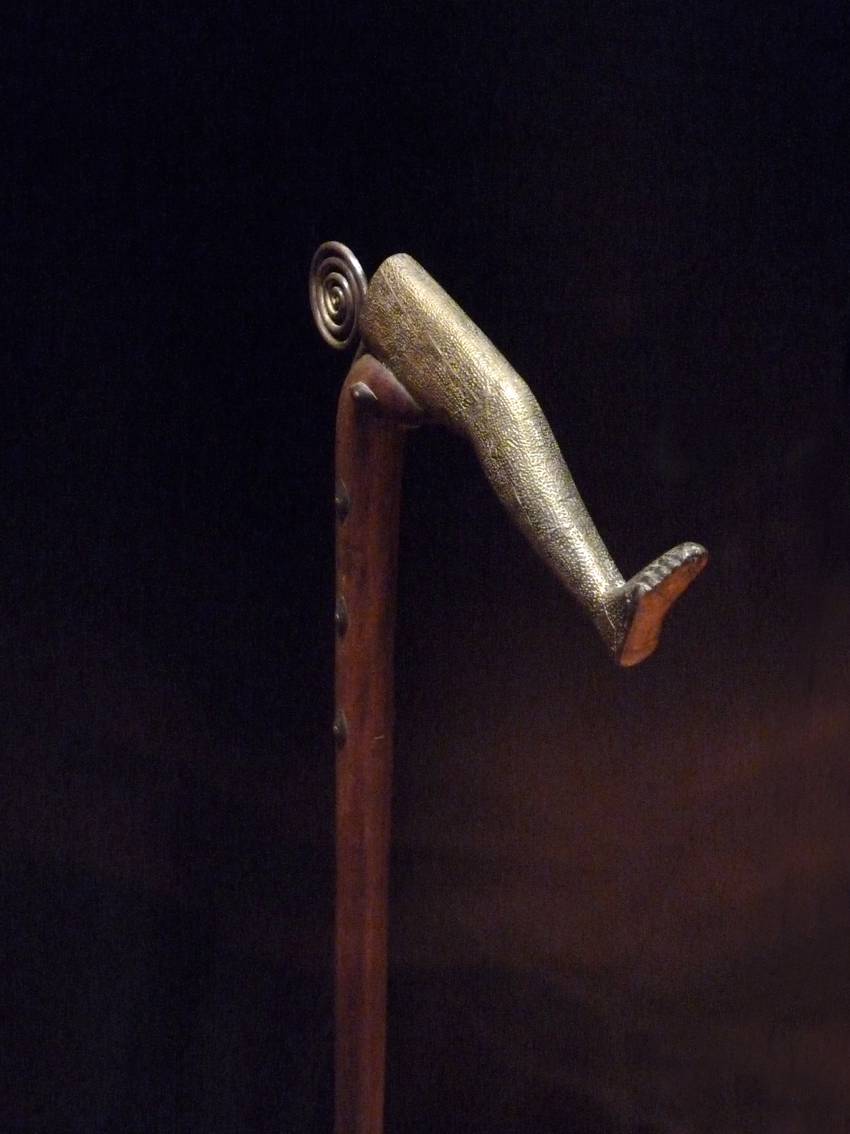 Récade (Fon, Abomey) au musée du quai Branly